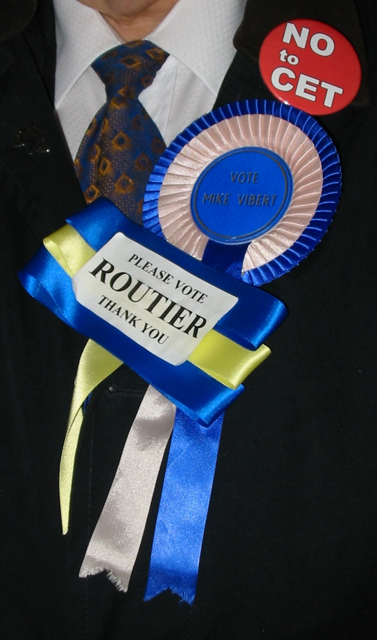 Nrf: Êlections au mais d'Octobre 2008, Jèrri